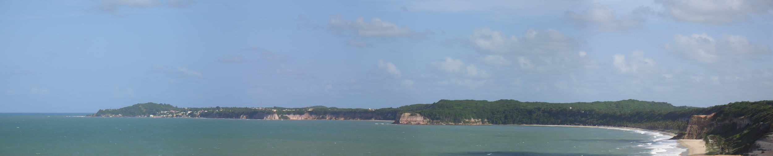 Litoral de Pipa, Praias do Madeiro, dos Golfinhos, Praia central